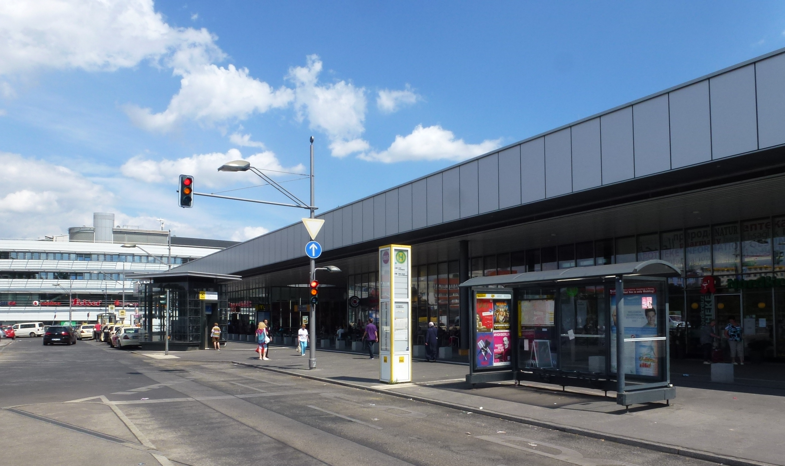 Berlin-Gesundbrunnen Bahnhofsgebäude